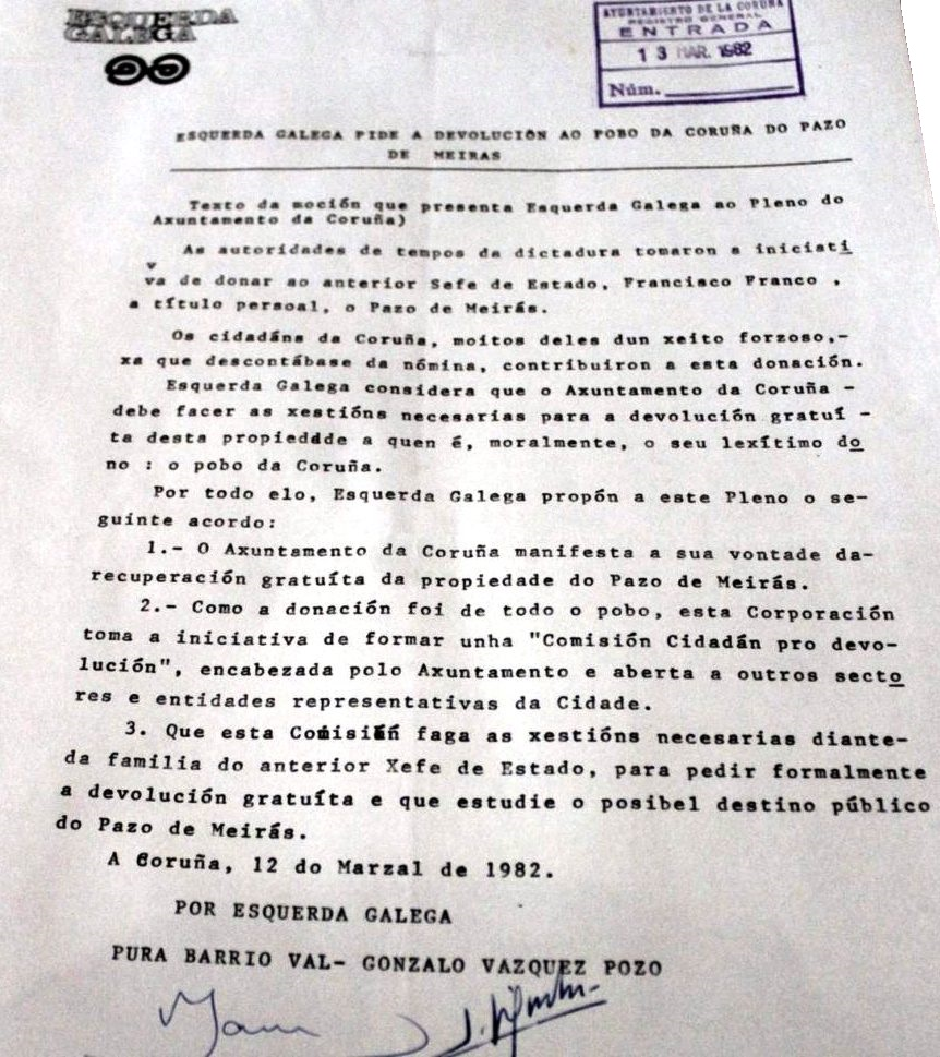 Esquerda Galega pide a devolución ao pobo da Coruña do Pazo de Meirás.